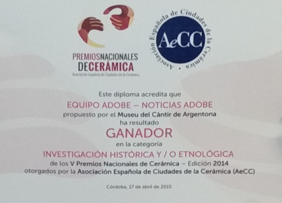 Reproducción fotográfica en dos dimensiones del título otorgado al Equipo Adobe y Noticias Adobe del Primer Premio Nacional de Investigación Histórica y/o Etnológica concedido anualmente por la Asociación Española de Ciudades de la Cerámica, en su V Edición (2015).